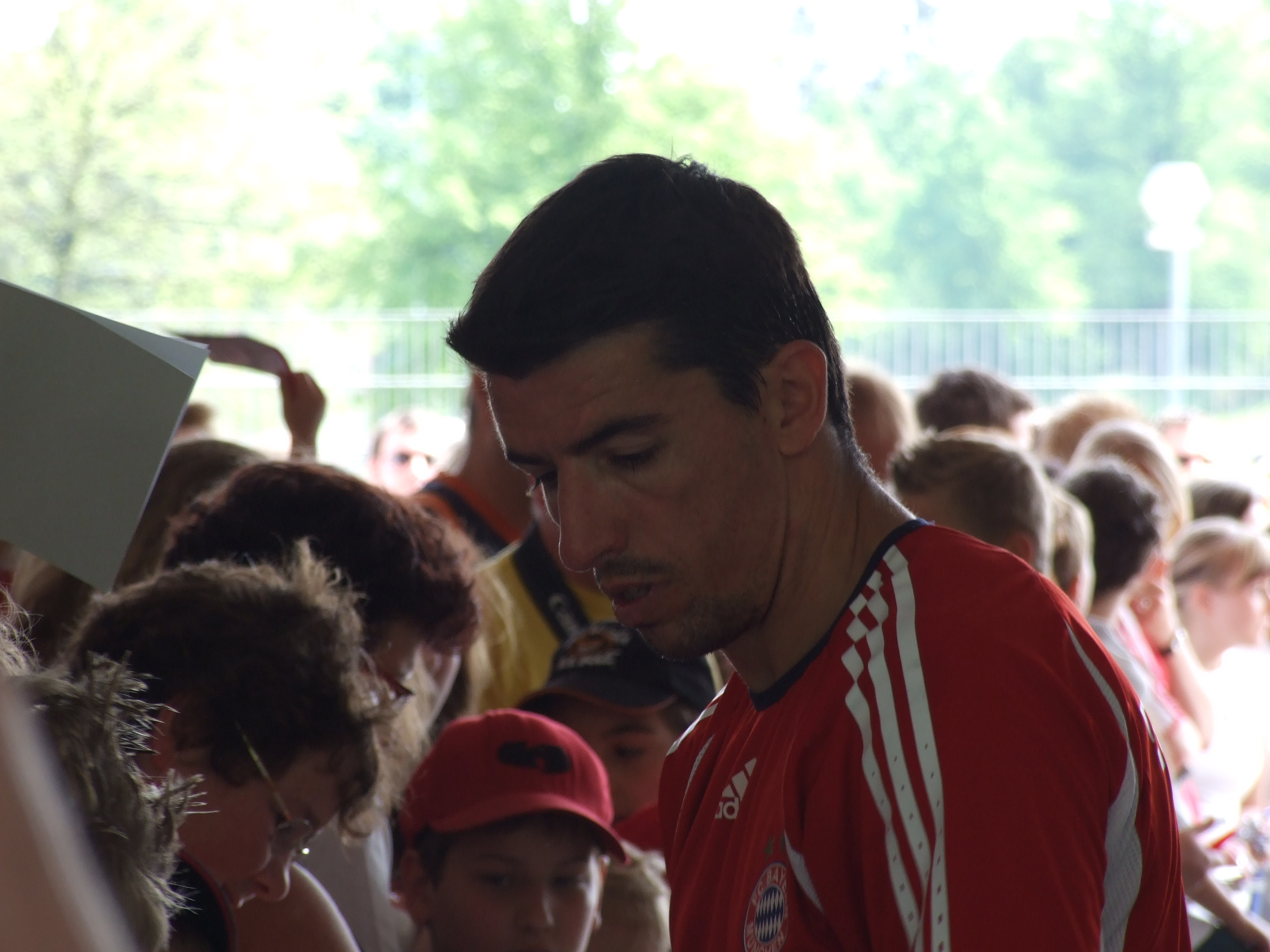 Roy Makaay